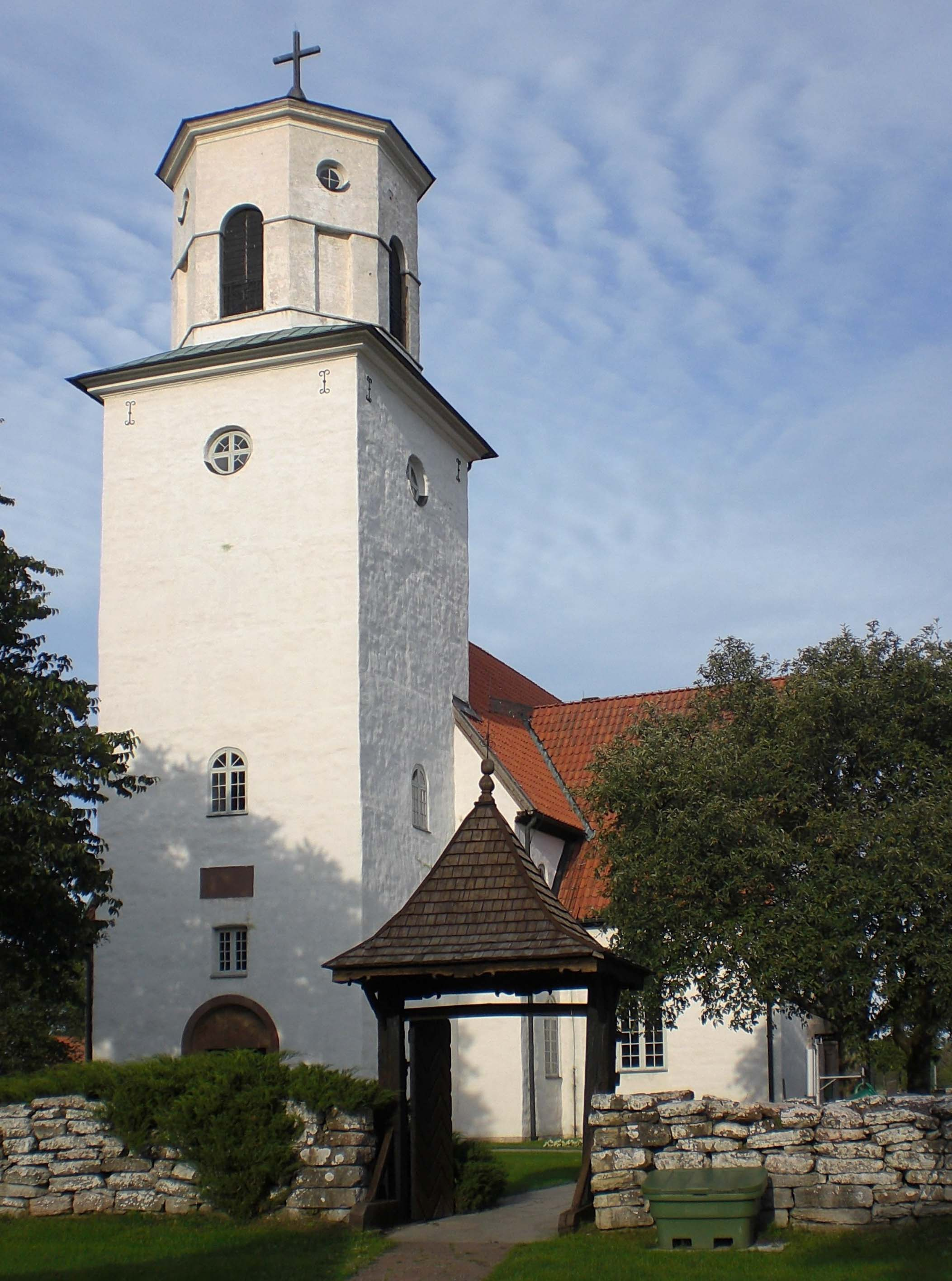 Kirche von Gärdslösa, Öland, Schweden, Westseite